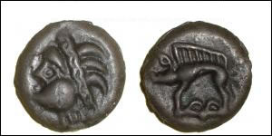 Monnaie gauloise en potin des Leuques (Gallia). Potin Tête d'indiens Leuque / Trois mèches. Photo du propriétaire GBlerot